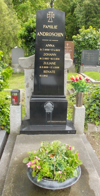 Wiener Zentralfriedhof-Hans Androschin